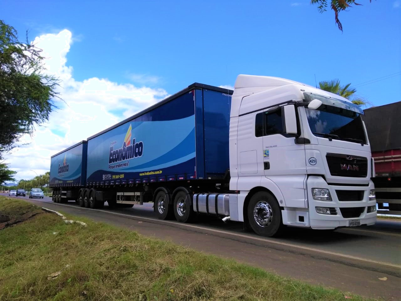 Carreta MAM de uma industria de produtos de higiene e limpeza de Codó, Maranhão, Brasil.